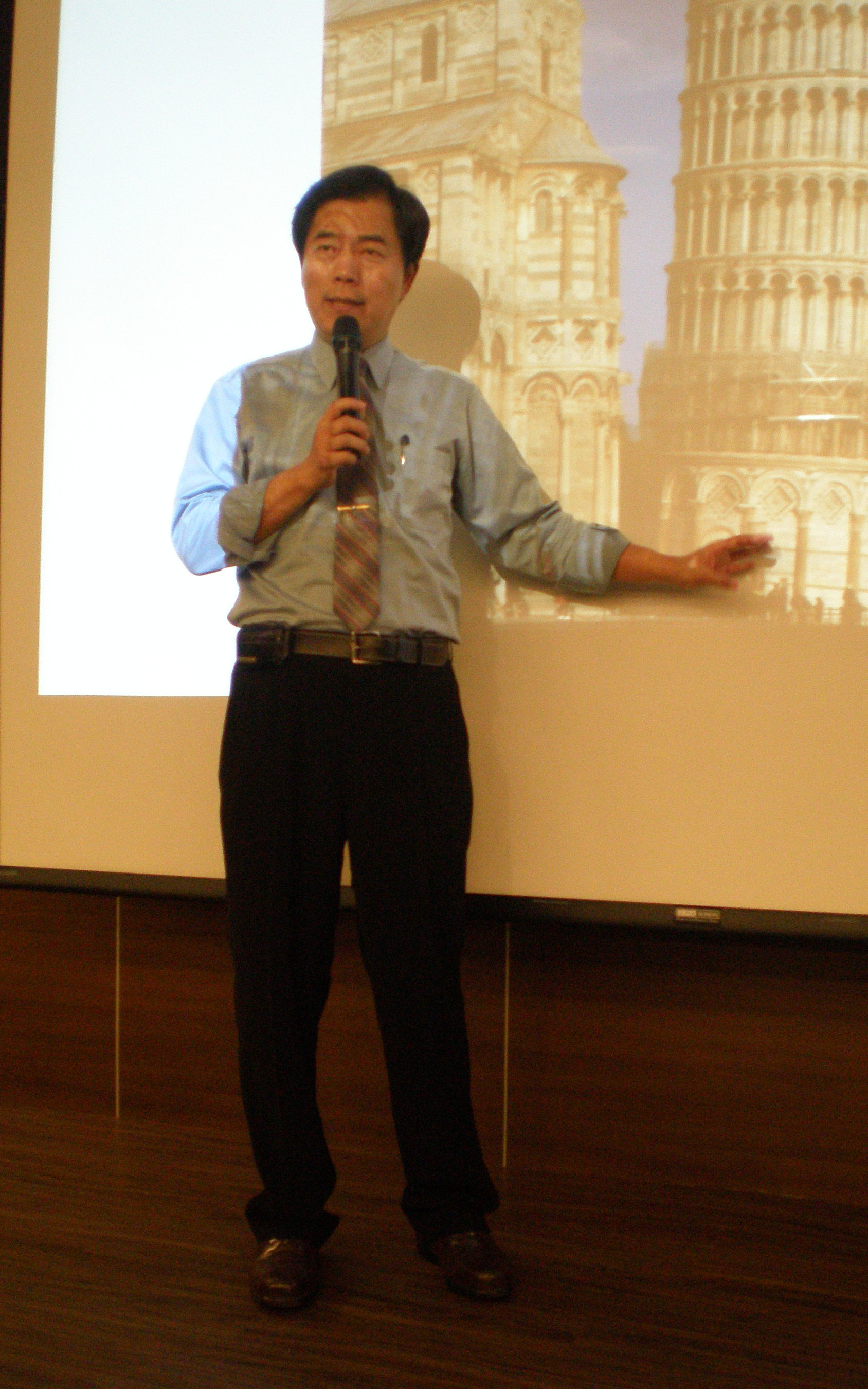 孫維新教授於2010年1月23日在國立科學工藝博物館演講